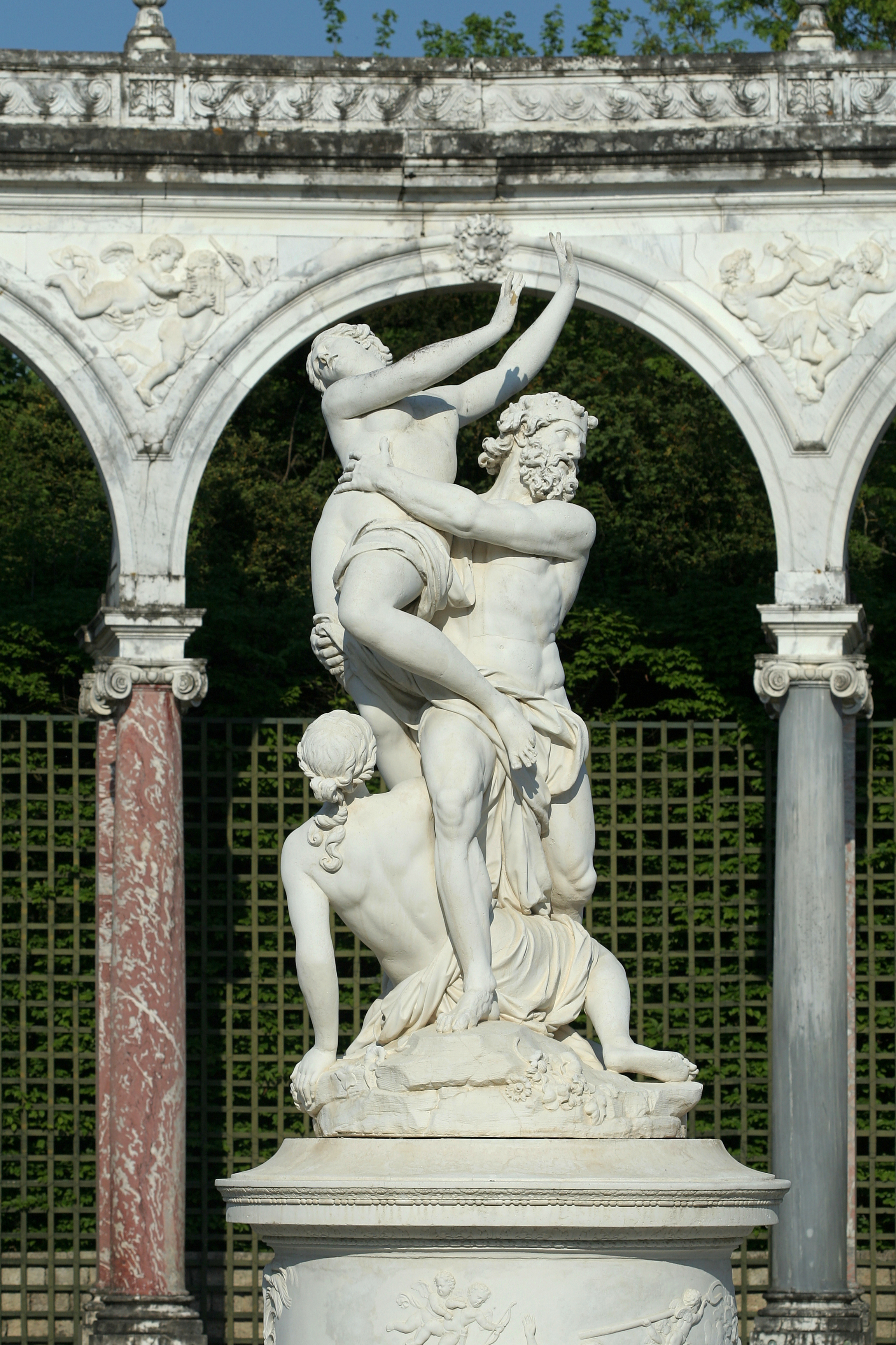 Parc de Versailles, bosquet de la Colonnade. Enlèvement de Proserpine par Pluton, moulage du groupe sculpté de François Girardon, 1677-1699.